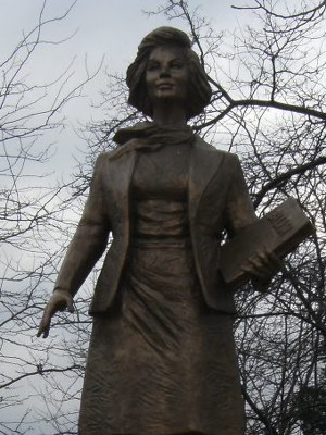 Bahriye Üçok heykeli , Bahçelievler , Ankara